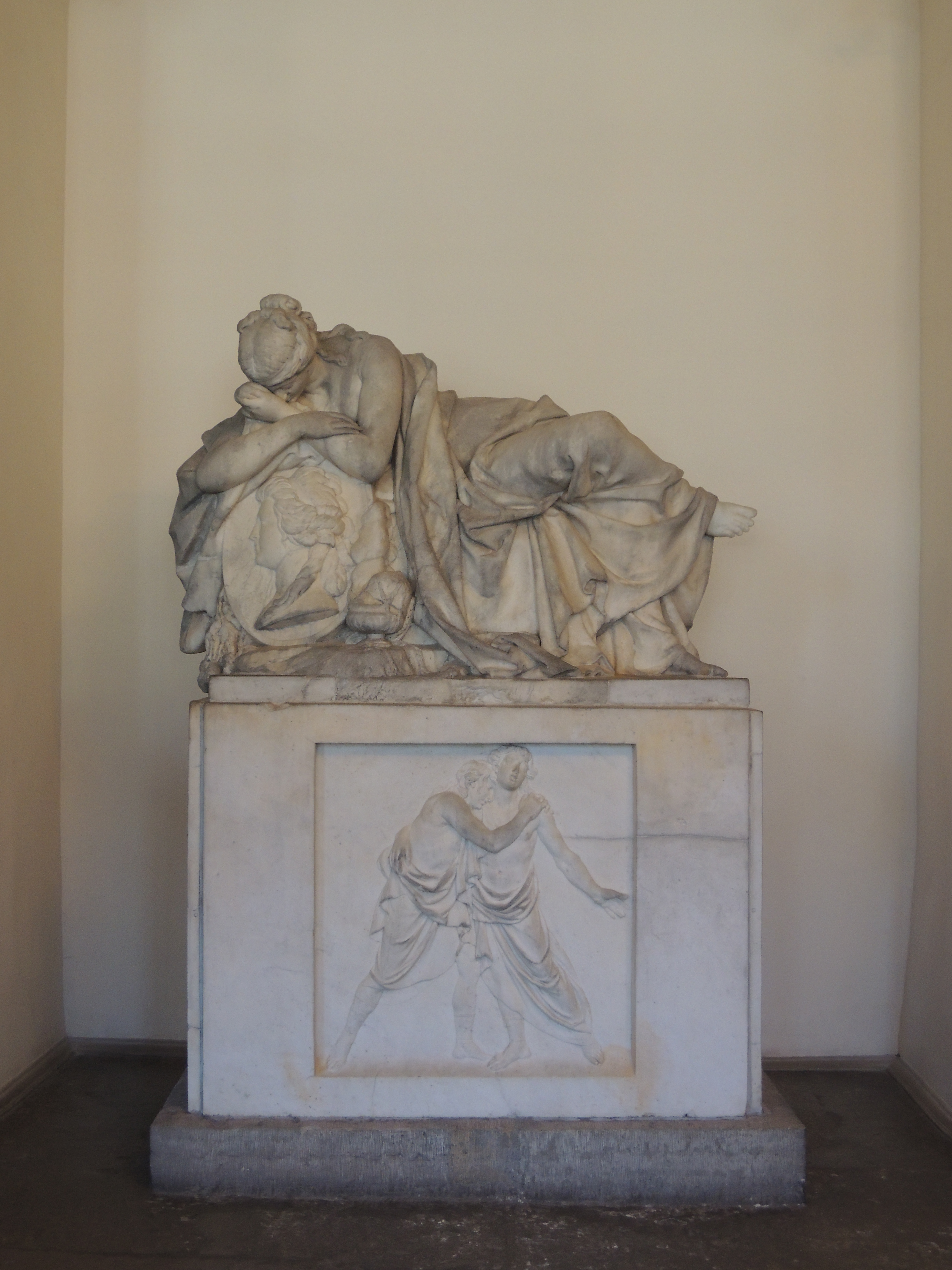 Благовещенская усыпальница Александро-Невской лавры. Куракина, Елена Степановна, урожд. Апраксина (1735—1769). Скульптурный памятник. Уронив голову на руки, горестно скрещенные над портретным медальоном, молодая плакальщица скорбит. Высокий прямоугольный постамент. Памятник перенесен из Некрополя XVIII века в 1954 г. гг.